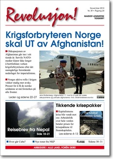 Tidsskriftet Revolusjon, november 2010.